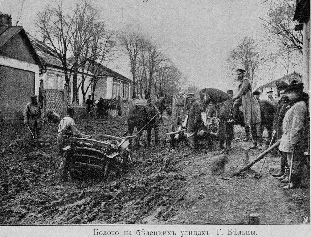 Străzile oraşului Bălţi la sfârşitul secolului XIX